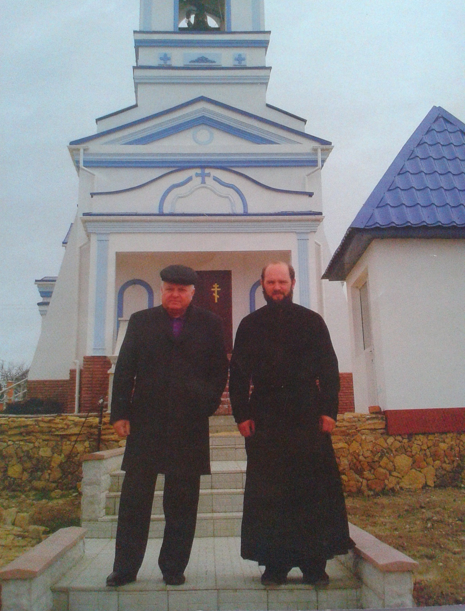 Горбатов В.М і протоієрей Сергій